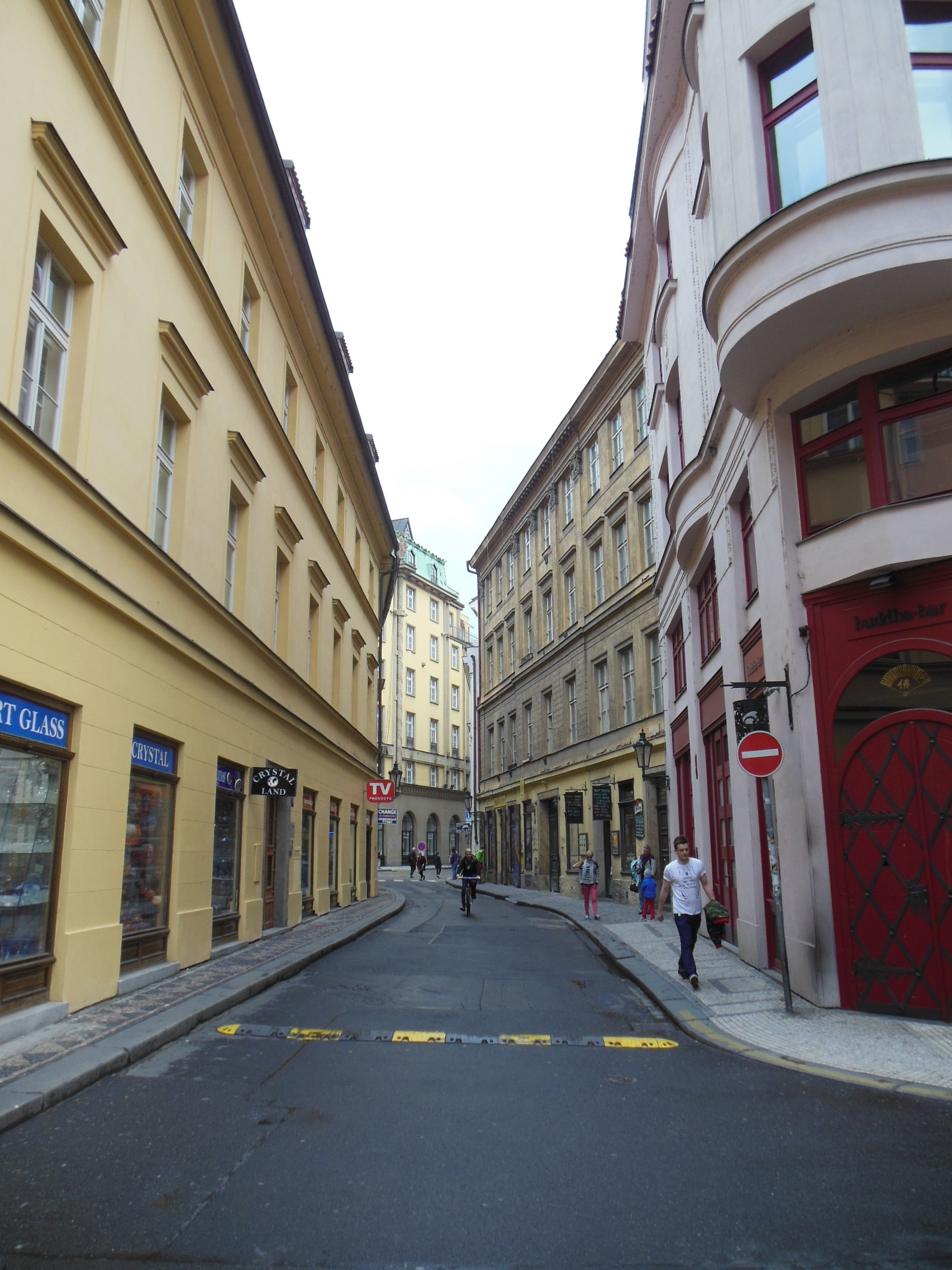 Ulice Rybná na Starém Městě v Praze. V pozadí ulice Králodvorská.